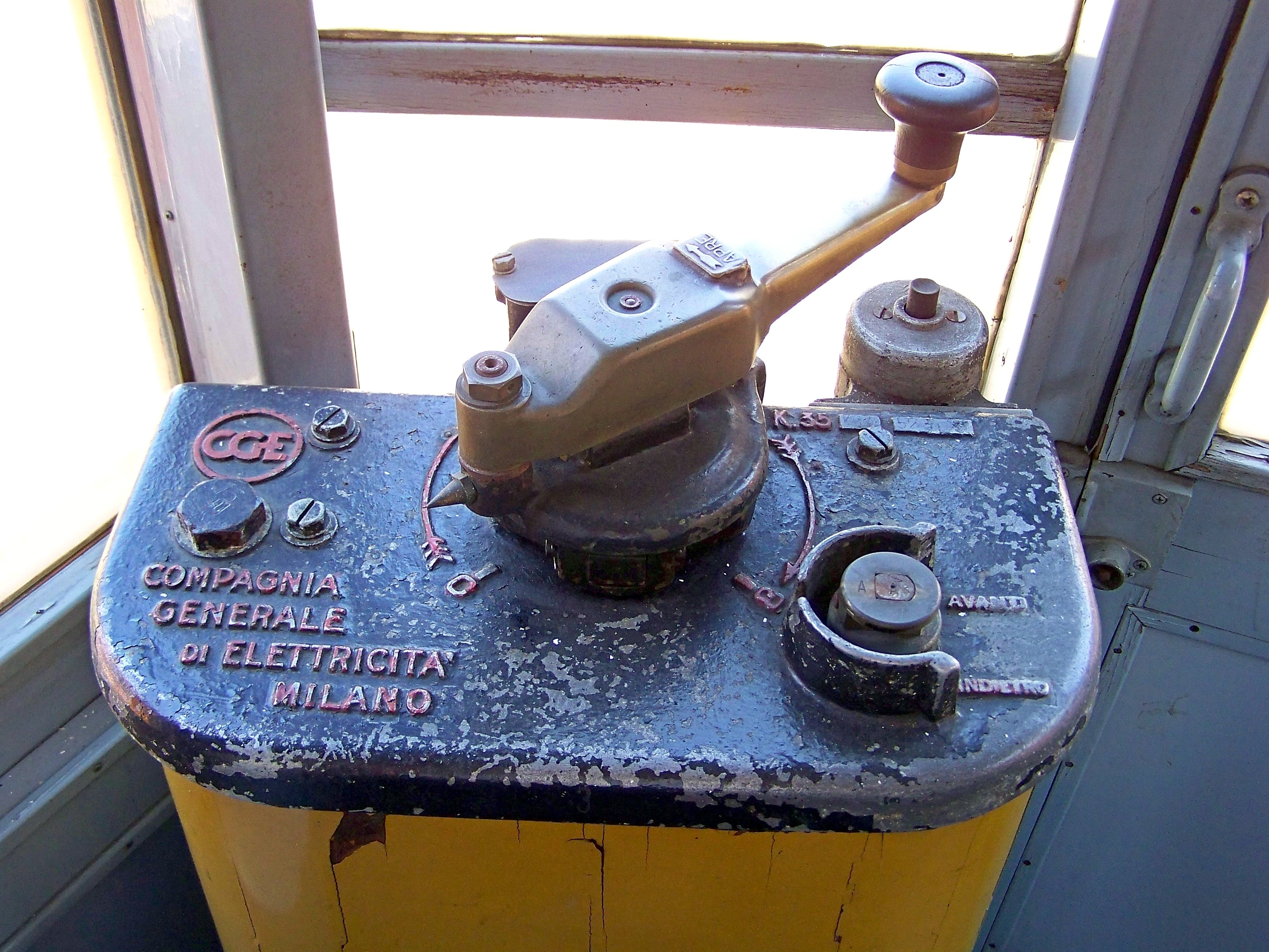 Il banco di manovra K35 dell'elettromotrice ATM "Desio" 46